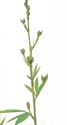 Cajanus cajan, ramo com botões florais